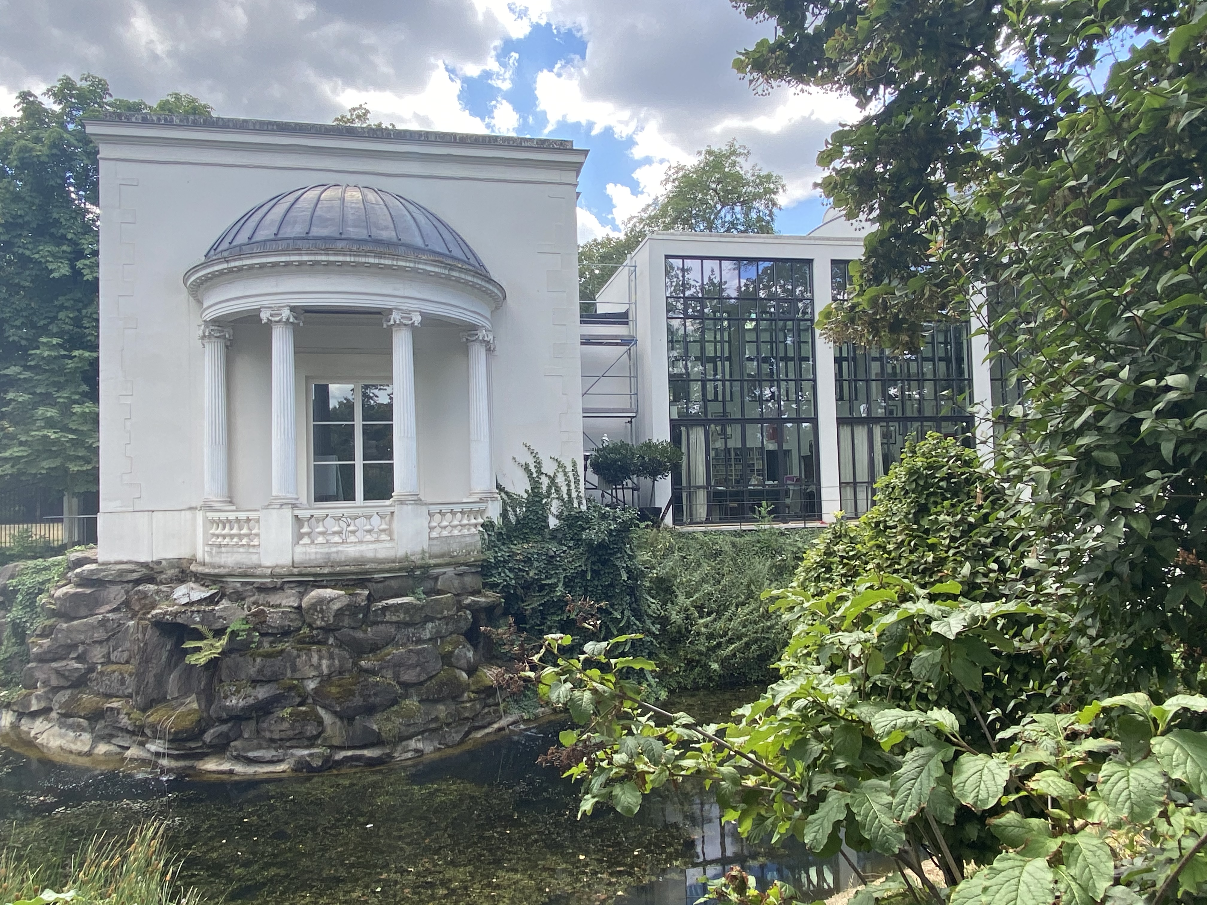 Der historische Lili-Tempel in Offenbach am Main mit dem modernen Anbau